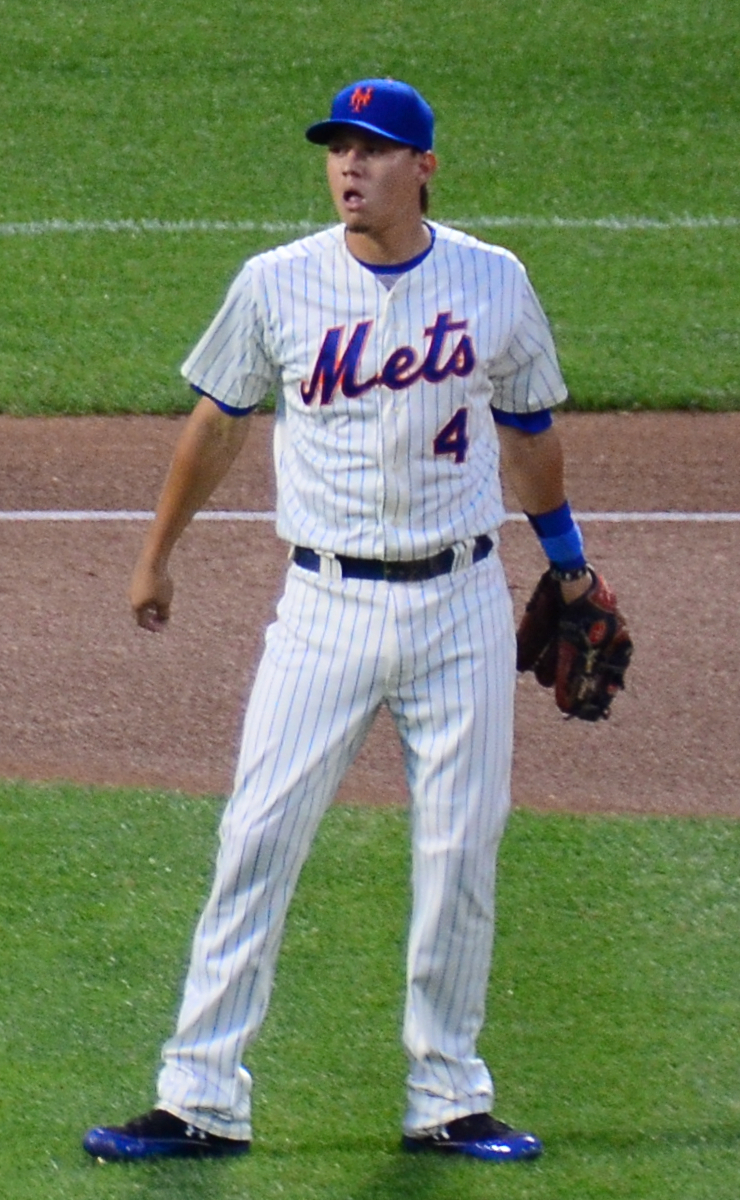 Wilmer Flores